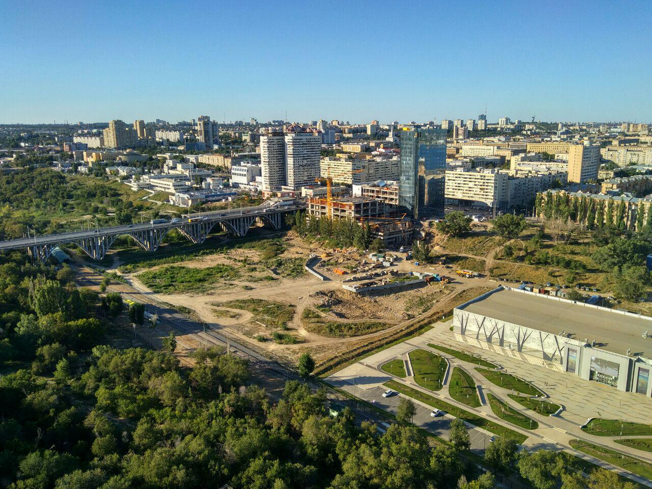 Вид на музей "Россия - Моя история", Парк в пойме реки Царица